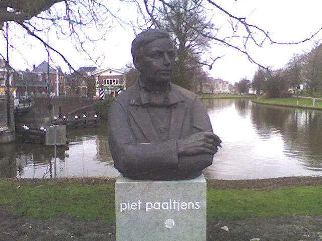 François Haverschmidt (aka Piet Paaltjens) buste in Leeuwarden. Made by Jentsje Popma in 1986.